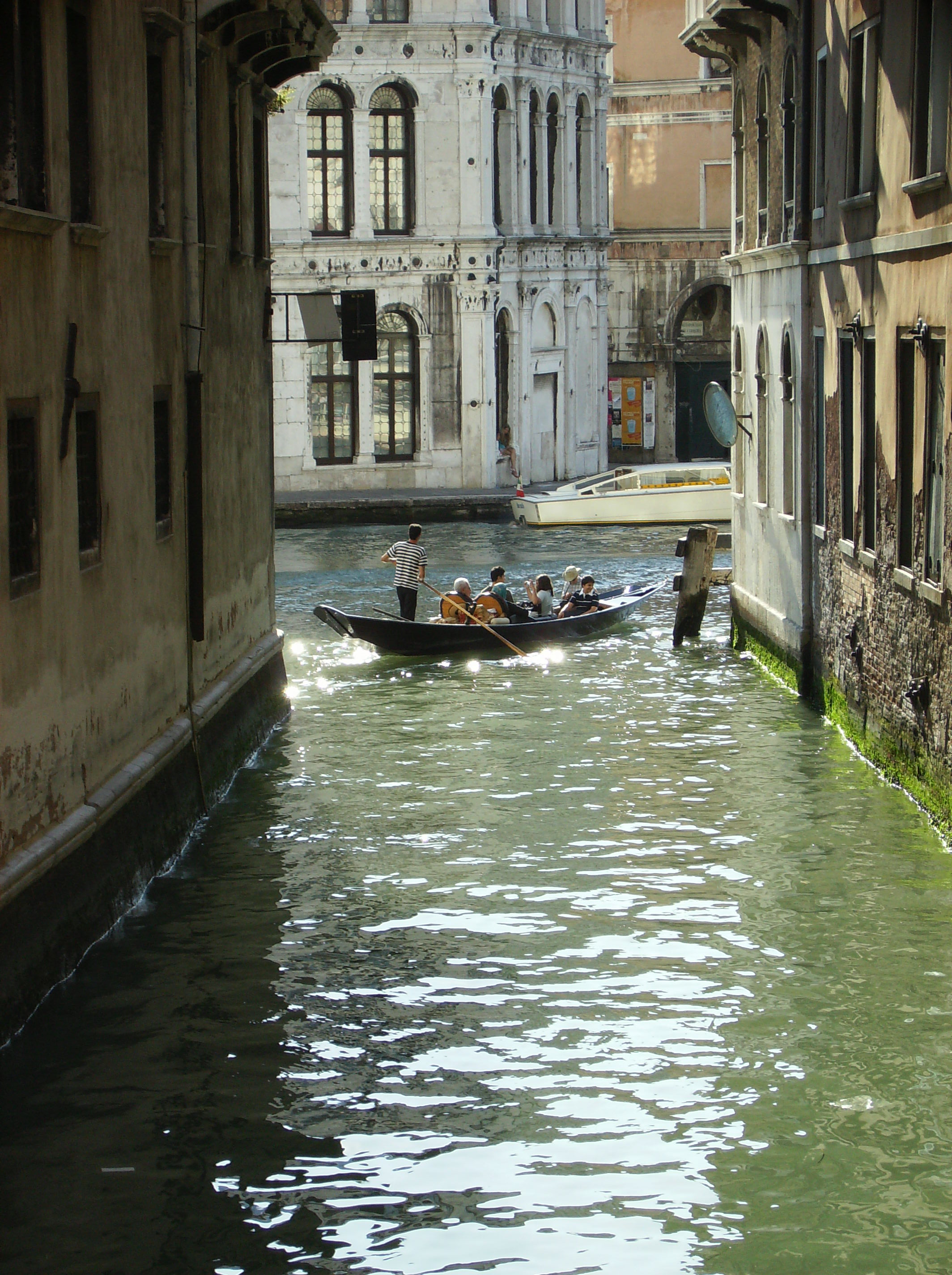 rio di fontego